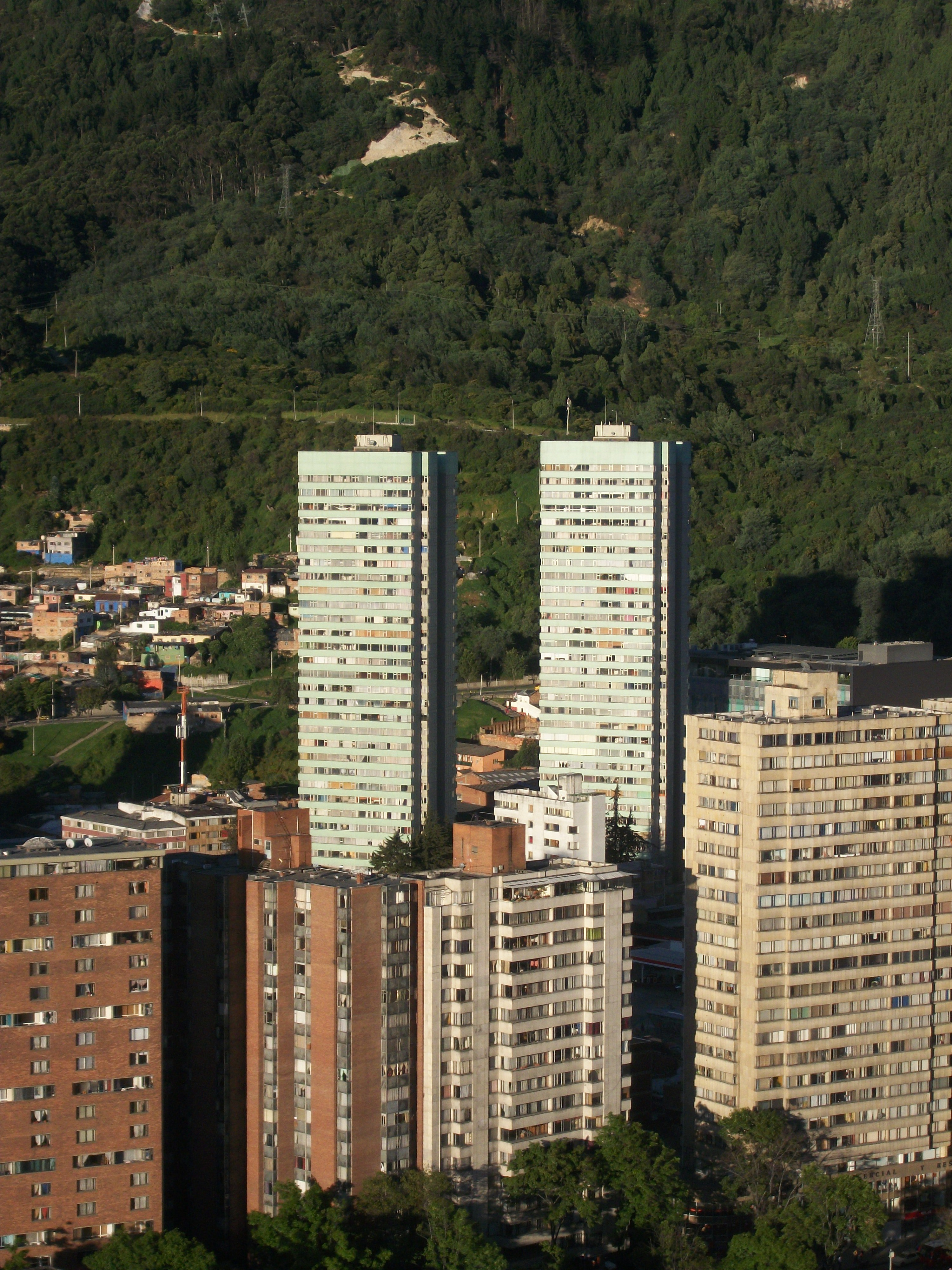 Torres de Fenicia, carrera 3 calle 22, barrio Germania, Bogotá, Colombia.